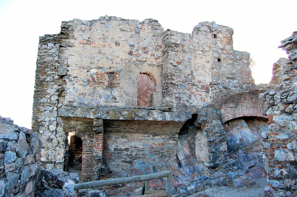 Castillo de Mirabel, provincia de Cáceres, España.